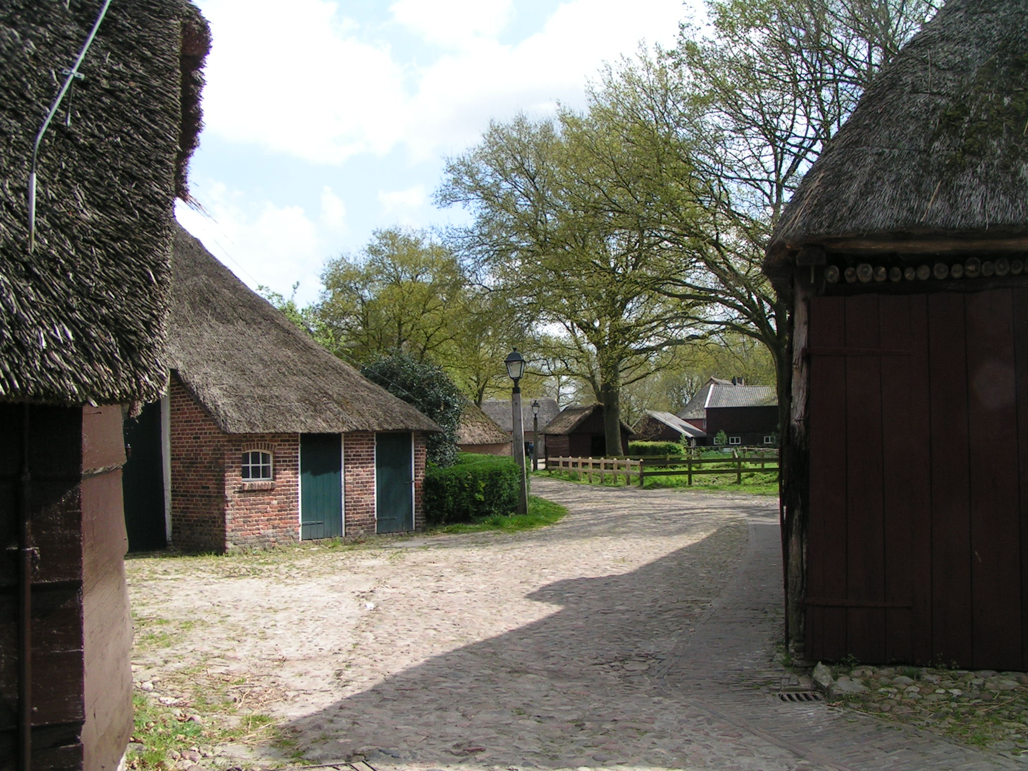 Openluchtmuseum Orvelte